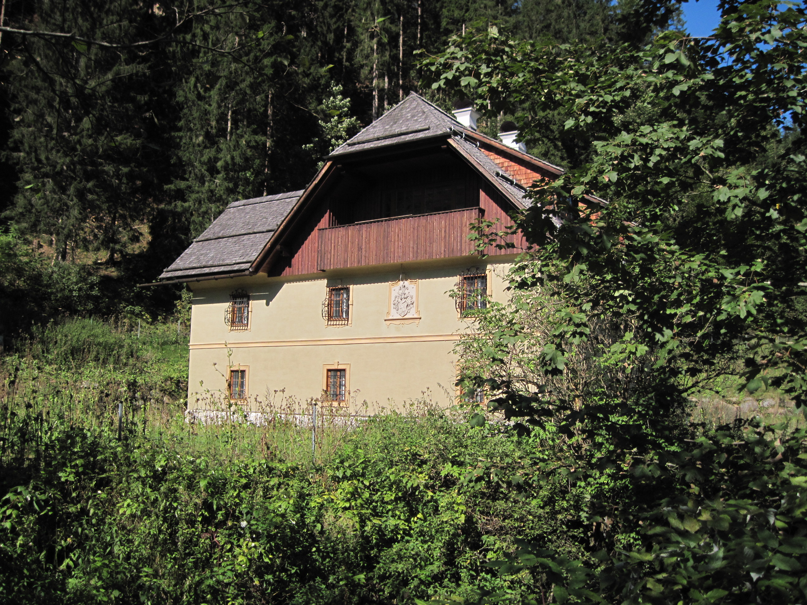 Gewerkenhaus vulgo Tatschenhammer